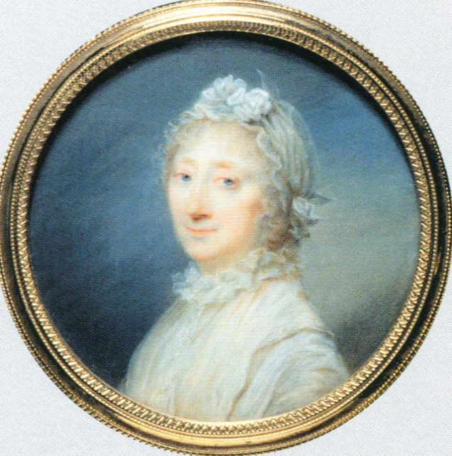 Елизавета Ивановна Орлова, ур. Штакельберг (1741-7.09.1817)